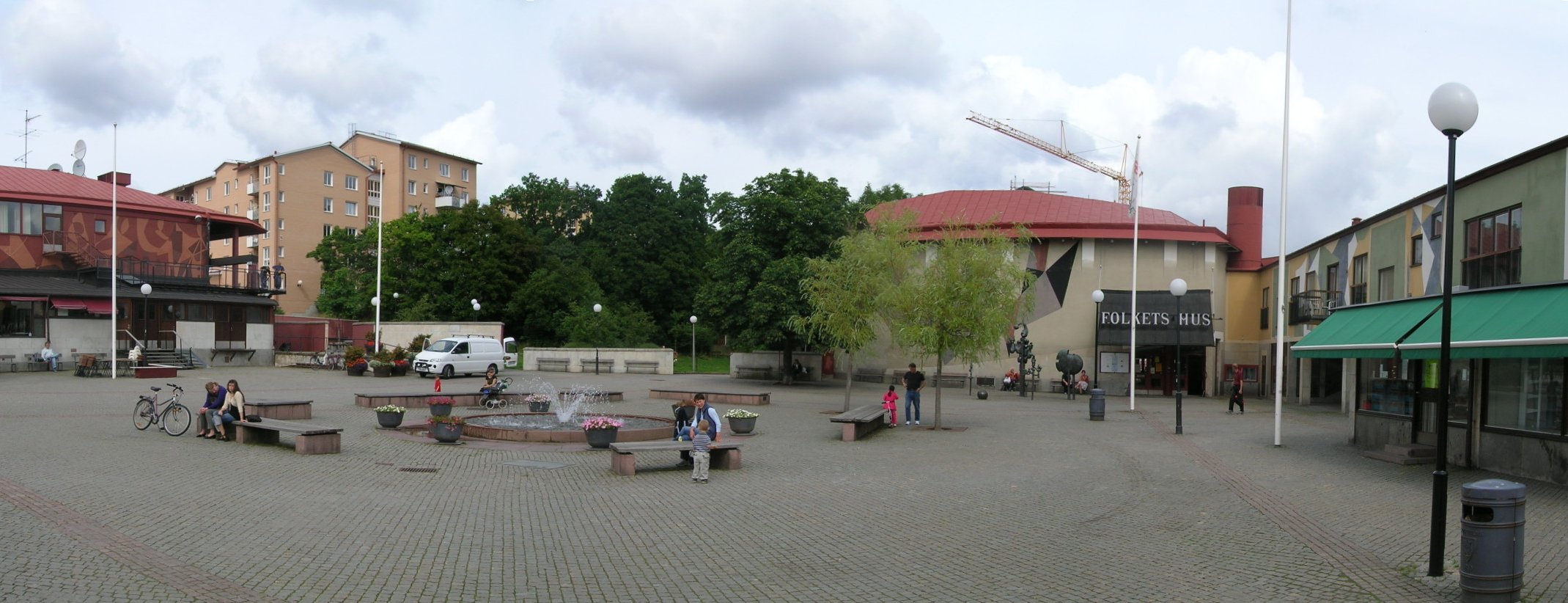 Årsta torg invigdes 1953 och formgavs av Erik och Tore Ahlsén. Här finns bl.a Folkets Hus, bibliotek och Vår Teater.